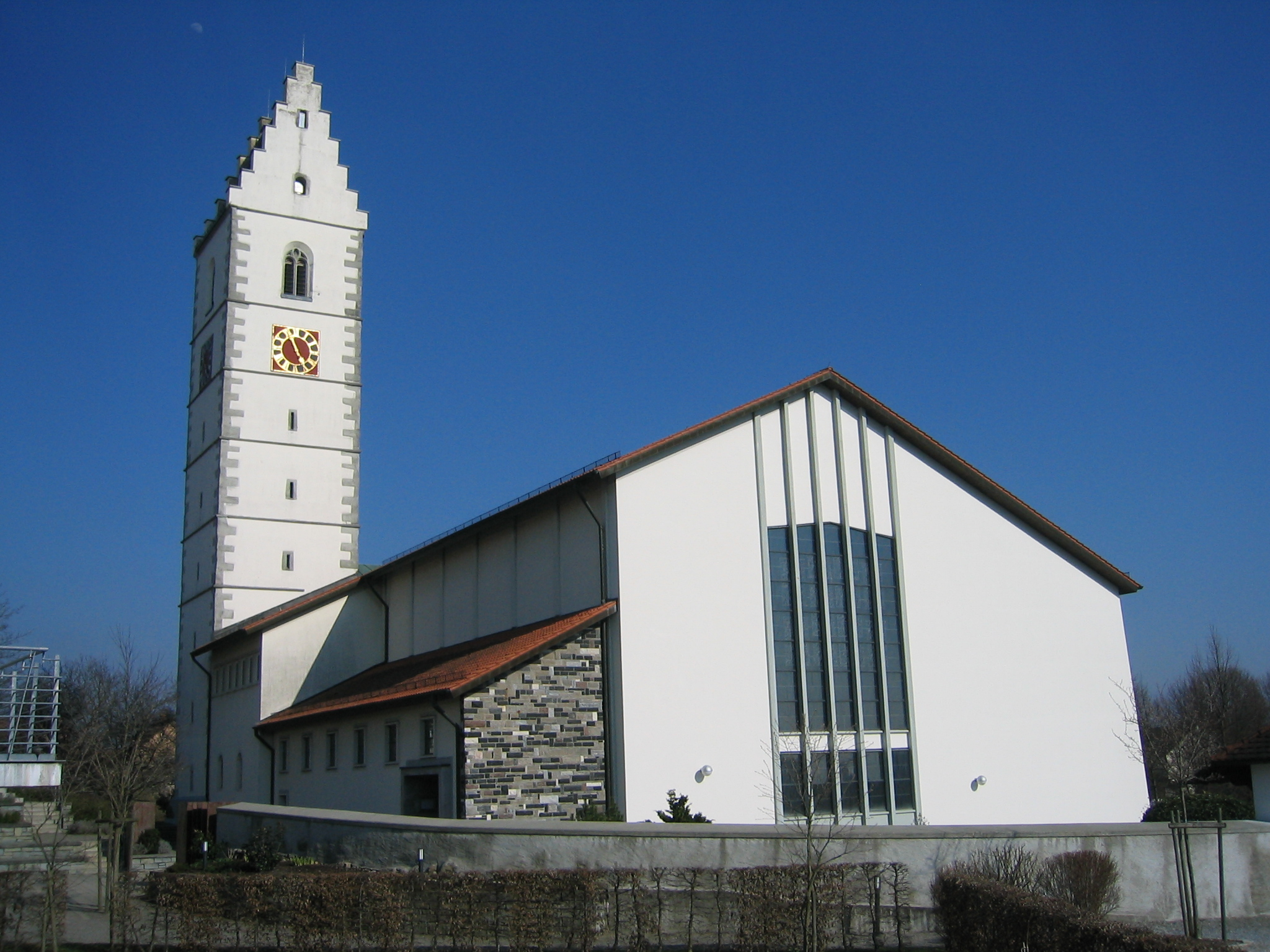 katholische Kirche St. Johann Baptist in Friedrichshafen-Ailingen selbst fotografiert am 7. April 2006